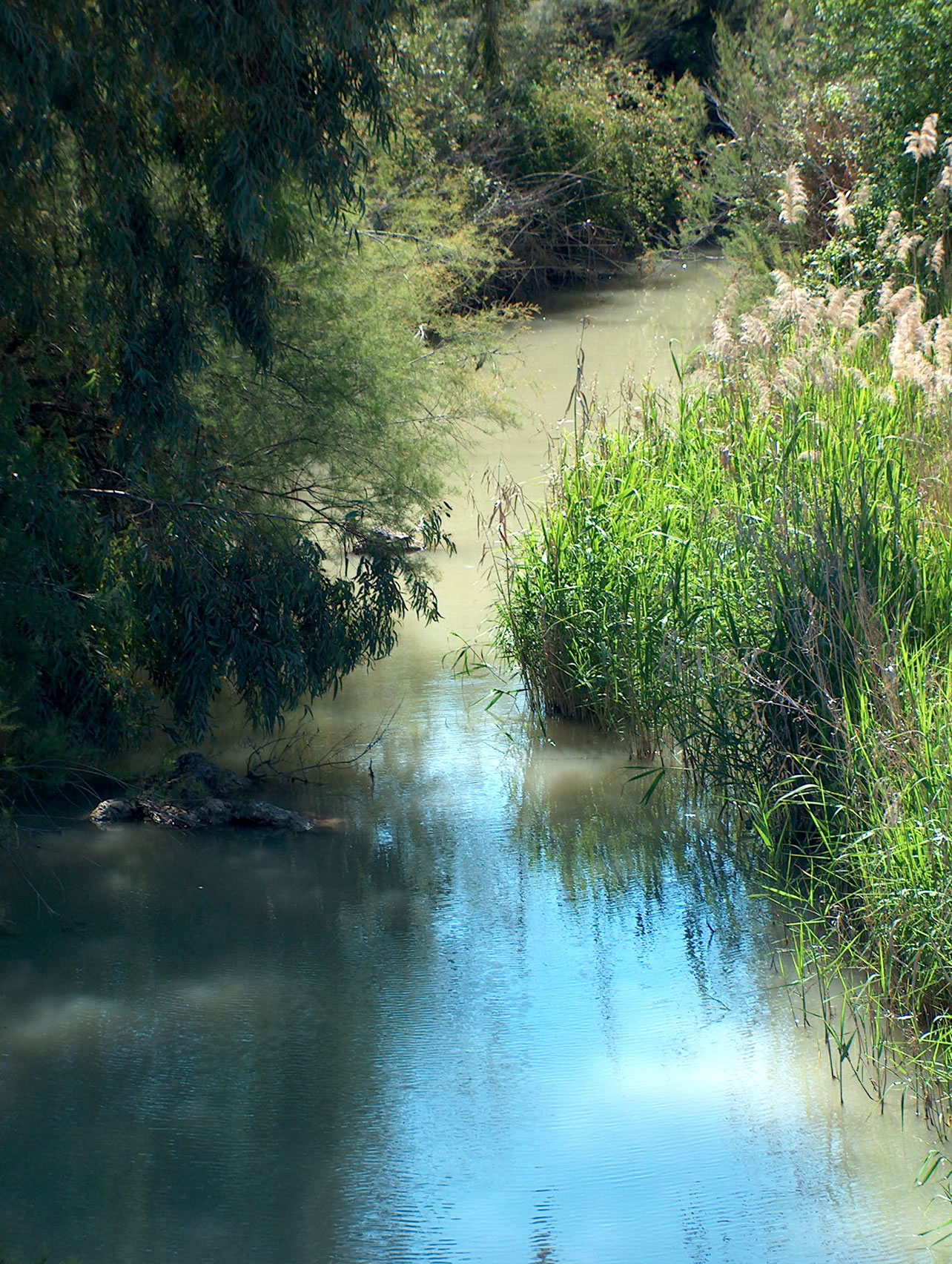 Río Corbones